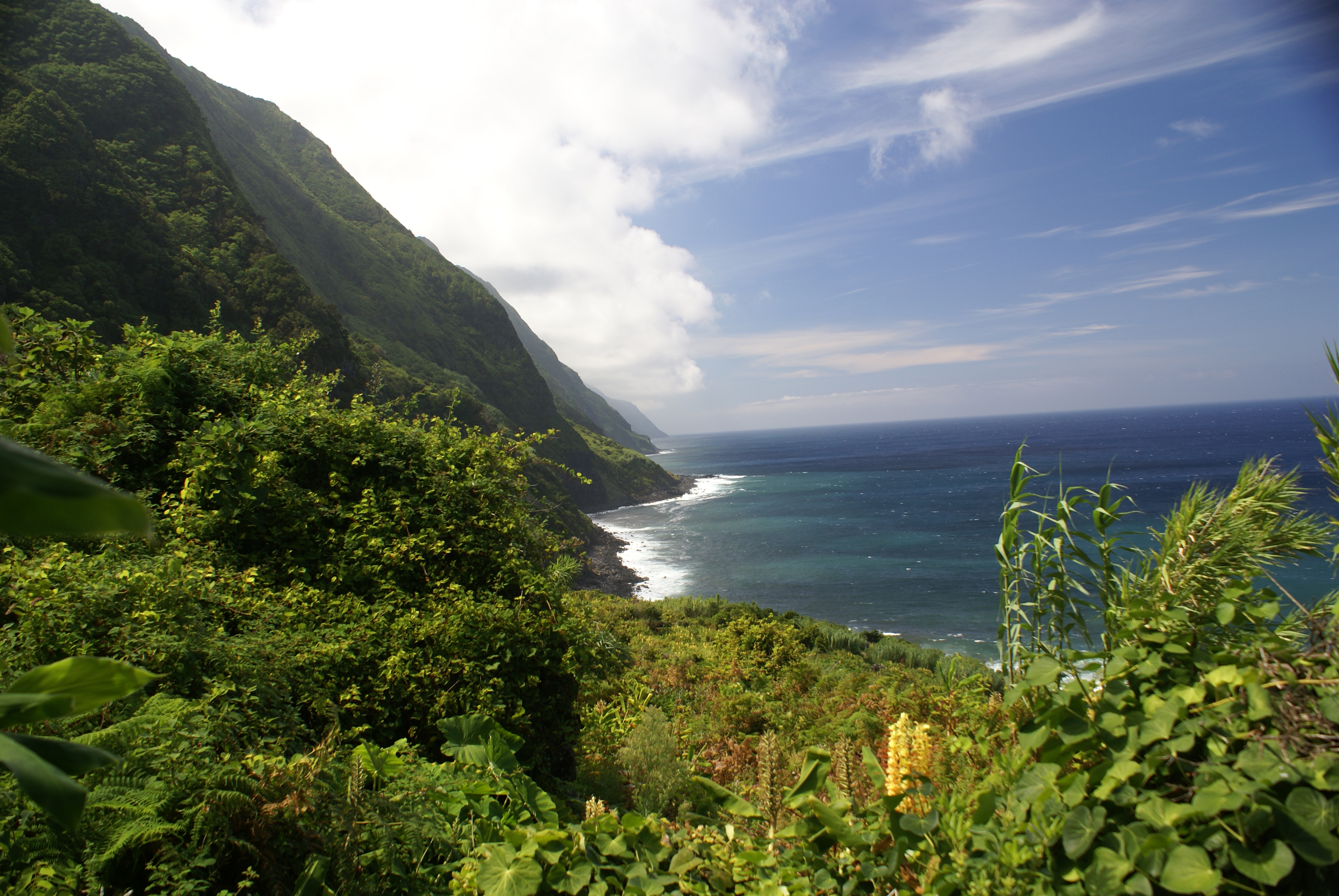 Fajã de Vasco Martins, falésias, Velas, ilhas de São Jorge, Açores